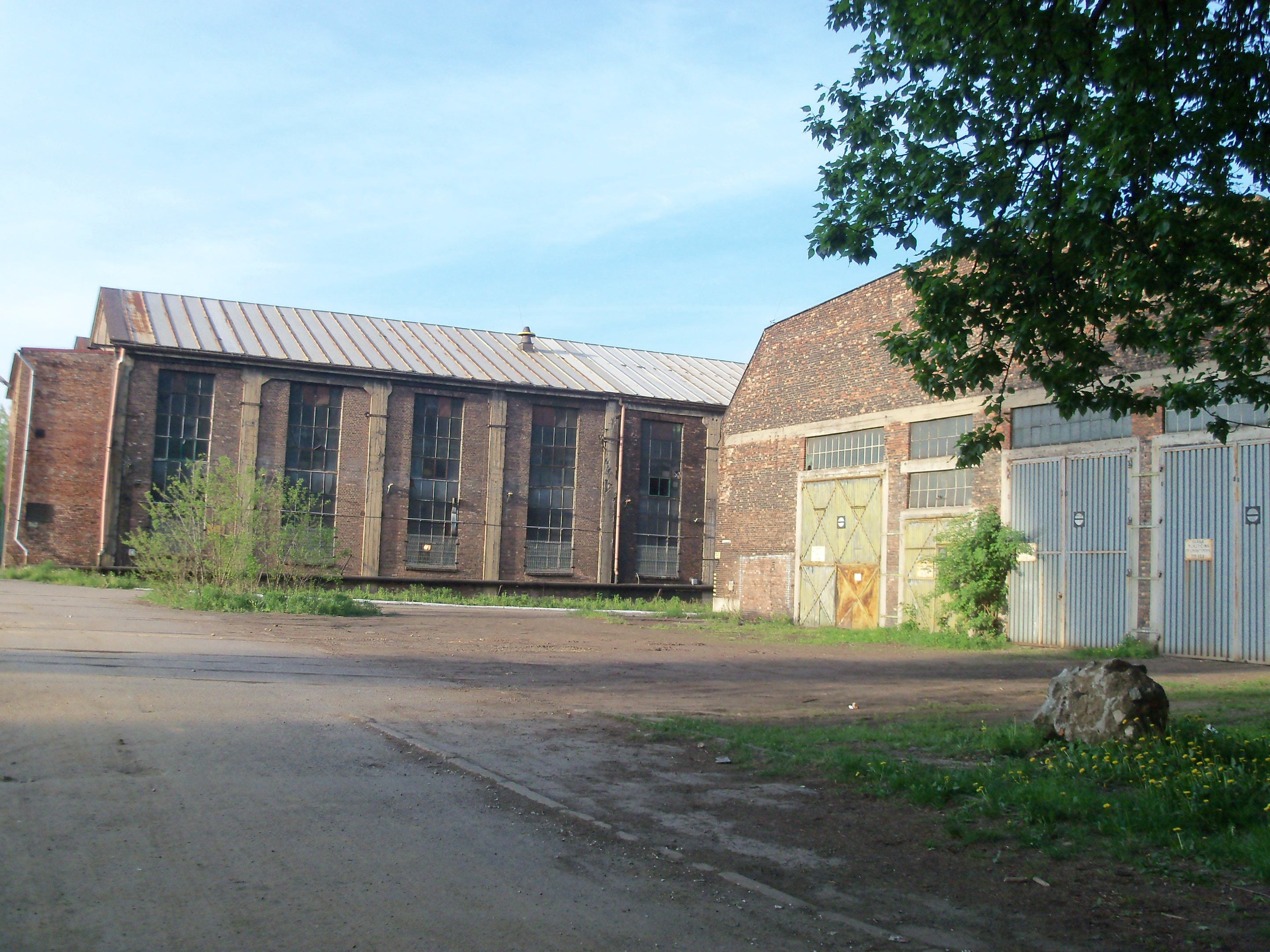 Huta Baildon w Katowicach